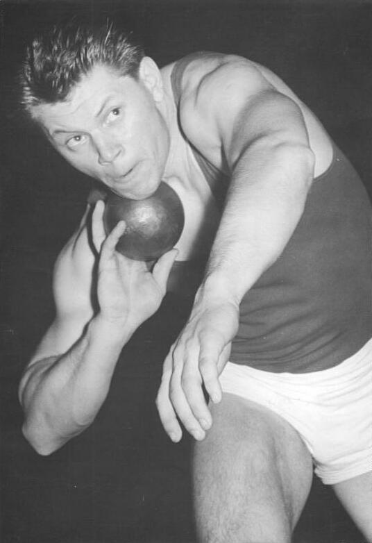 Plihan Zentralbild Wlocke 10.03.1957 DDR-Hallen-Leichtathletikmeisterschaften. Am Sonnabend, dem 09.03.1957, fand in der Sporthalle der DHfK, Leipzig, die DDR-Hallen-Leichtathletikmeisterschaft statt. Als internationale Gäste nahmen an den Wettkämpfen auch Sportler aus der CSR teil. UBz: Im Kugelstossen der Männer belegte der Tschechoslowake Plihan den zweiter Platz. Plihan vor dem Stoß.